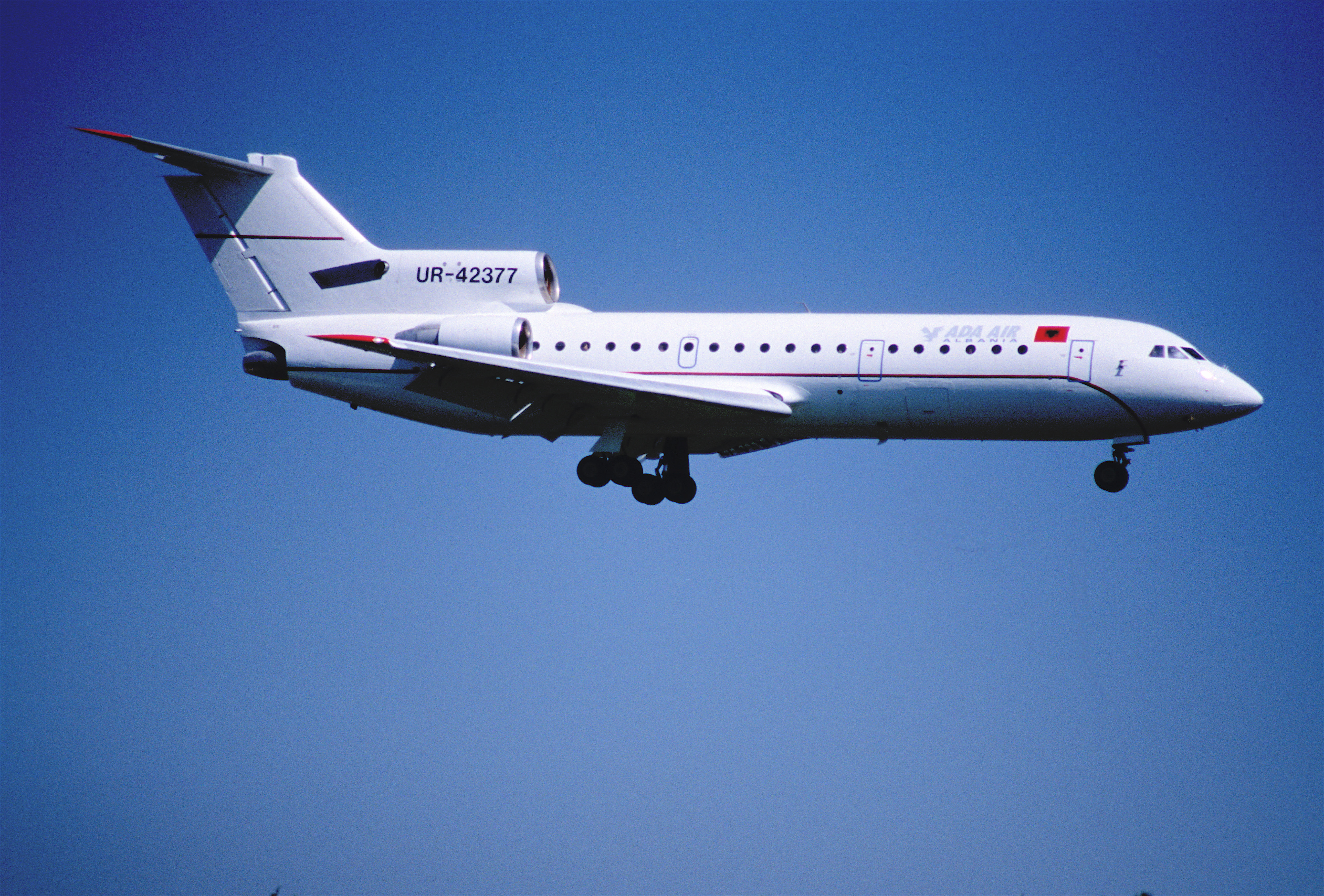 103ce - Ada Air Albania Yakovlev 42; UR-42377@ZRH;11.08.2000